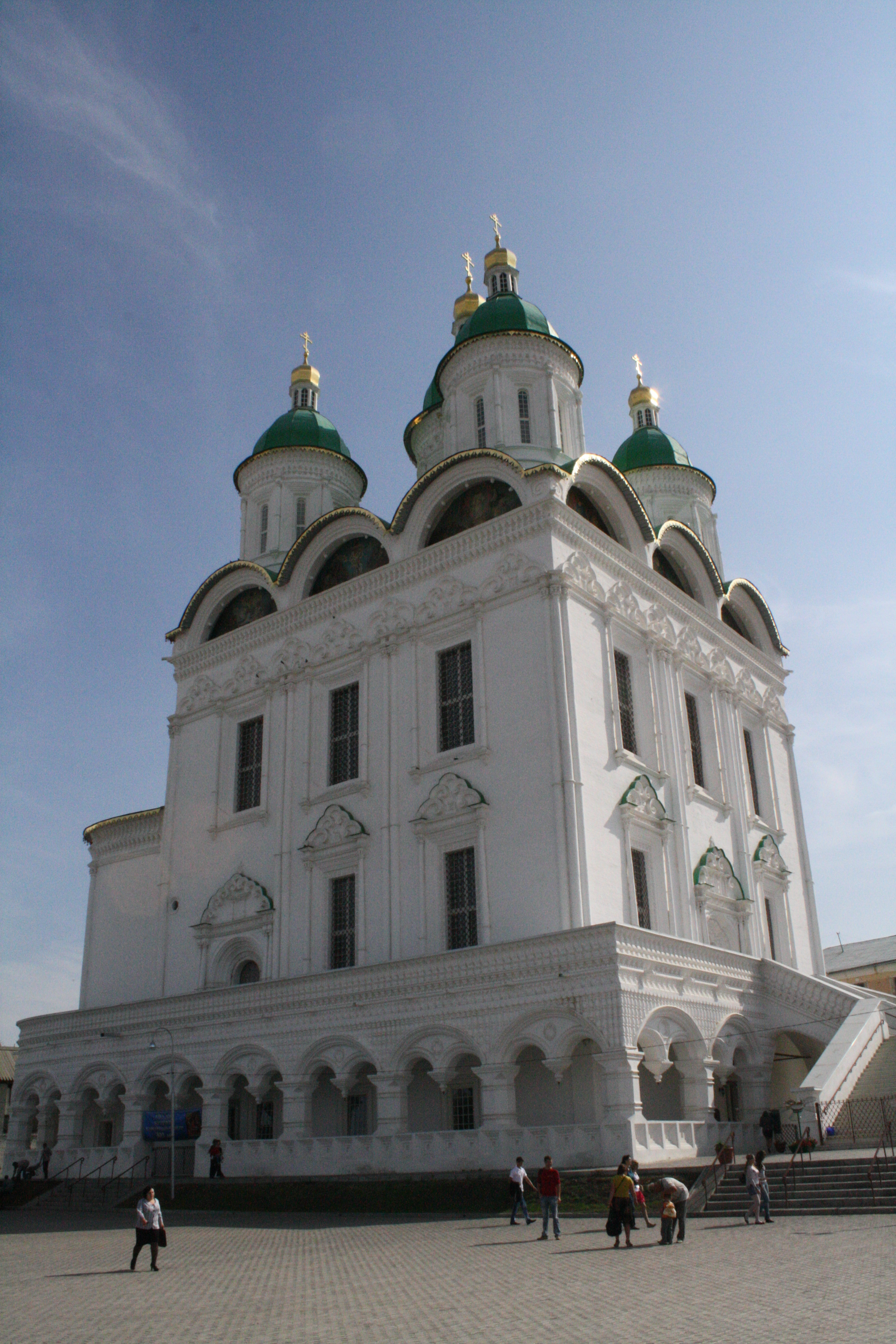 Uspenskiy cathedral. Astrakhan. Russia. Успенский собор. Астрахань. Россия